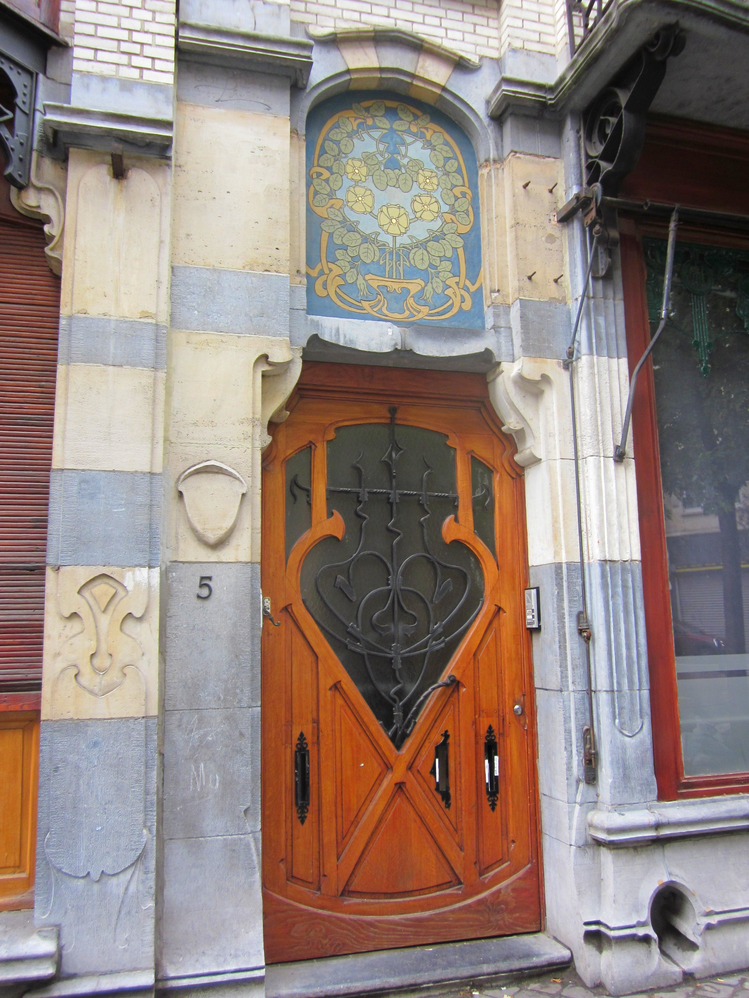 rue vanderschrick, 5 bxl